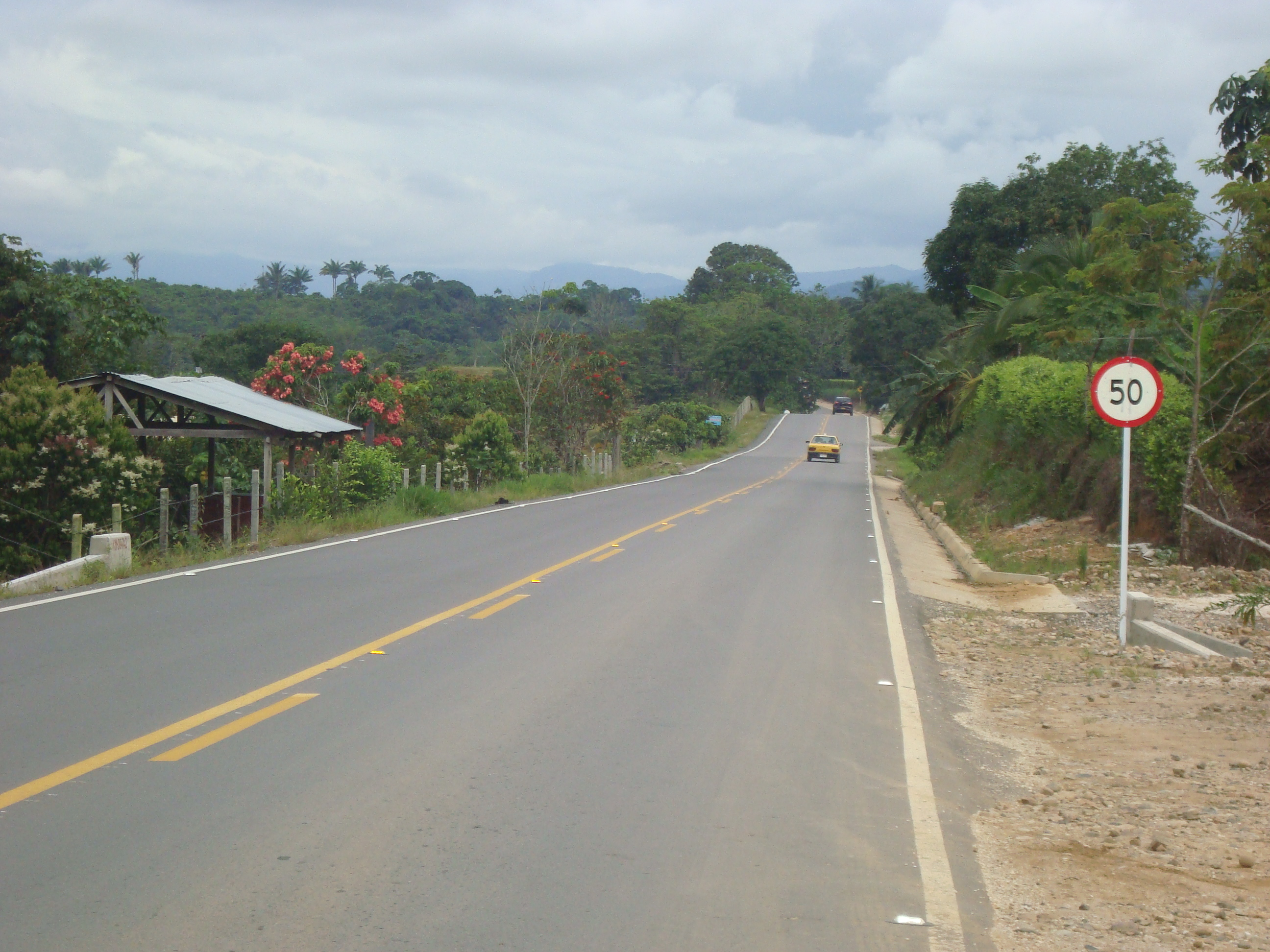 Carretera Marginal de la Selva en Colombia, en sector rural de Florencia (Caquetá).